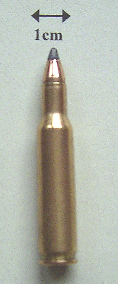 Teilmatelpatrone vermutlich zur Rehjagd. Das Projektil hat einen Kupferüberzug, an der Spitze liegen etwa 2,5 mm des Bleikerns frei. Alle Angaben ca.: Länge 5,2 cm, Durchmesser Boden 9,5 mm, Kaliber 5,5 mm. Aufschrift des Bodens: SBP 222 REM